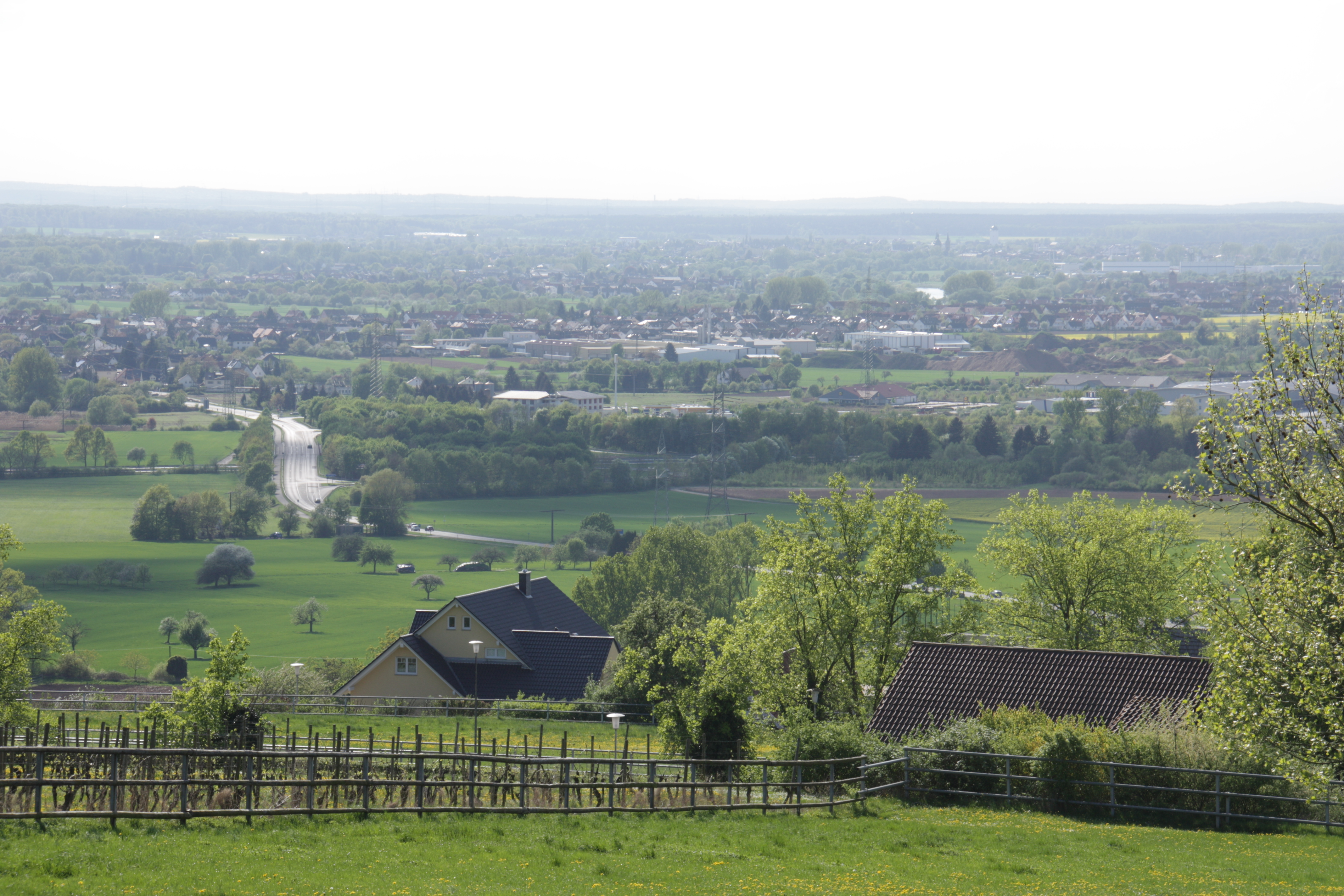 Blick von Hörstein auf Karlstein und Seligenstadt. Im Vordergrund verläuft die Autobahn A45 mit der Anschlußstelle Karlstein und dem Industriegebiet Alzenau-Süd. Dahinter liegen der Karlsteiner Ortsteil Dettingen und auf der anderen Mainseite der zu Seligenstadt gehörende Ort Kleinwelzheim. Am rechten Rand des Bildes ist der Karlsteiner Ortsteil Großwelzheim (mit Kirche und Innovationspark Karlstein) und die hessische Stadt Seligenstadt (mit Einhardsbasilika) zu erkennen.